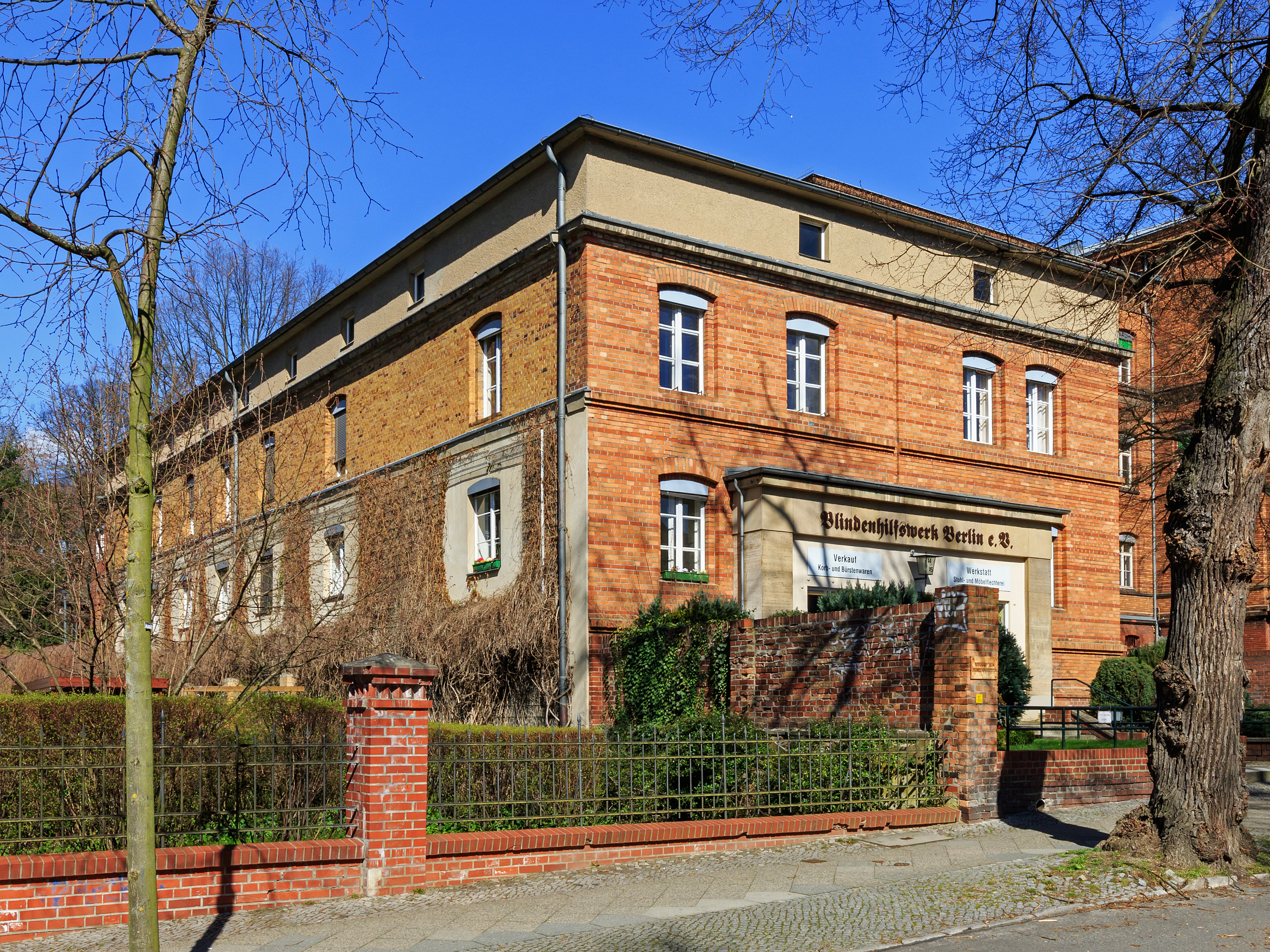 Das Blindenhilfswerk in der Rothenburgstraße, Berlin-Steglitz